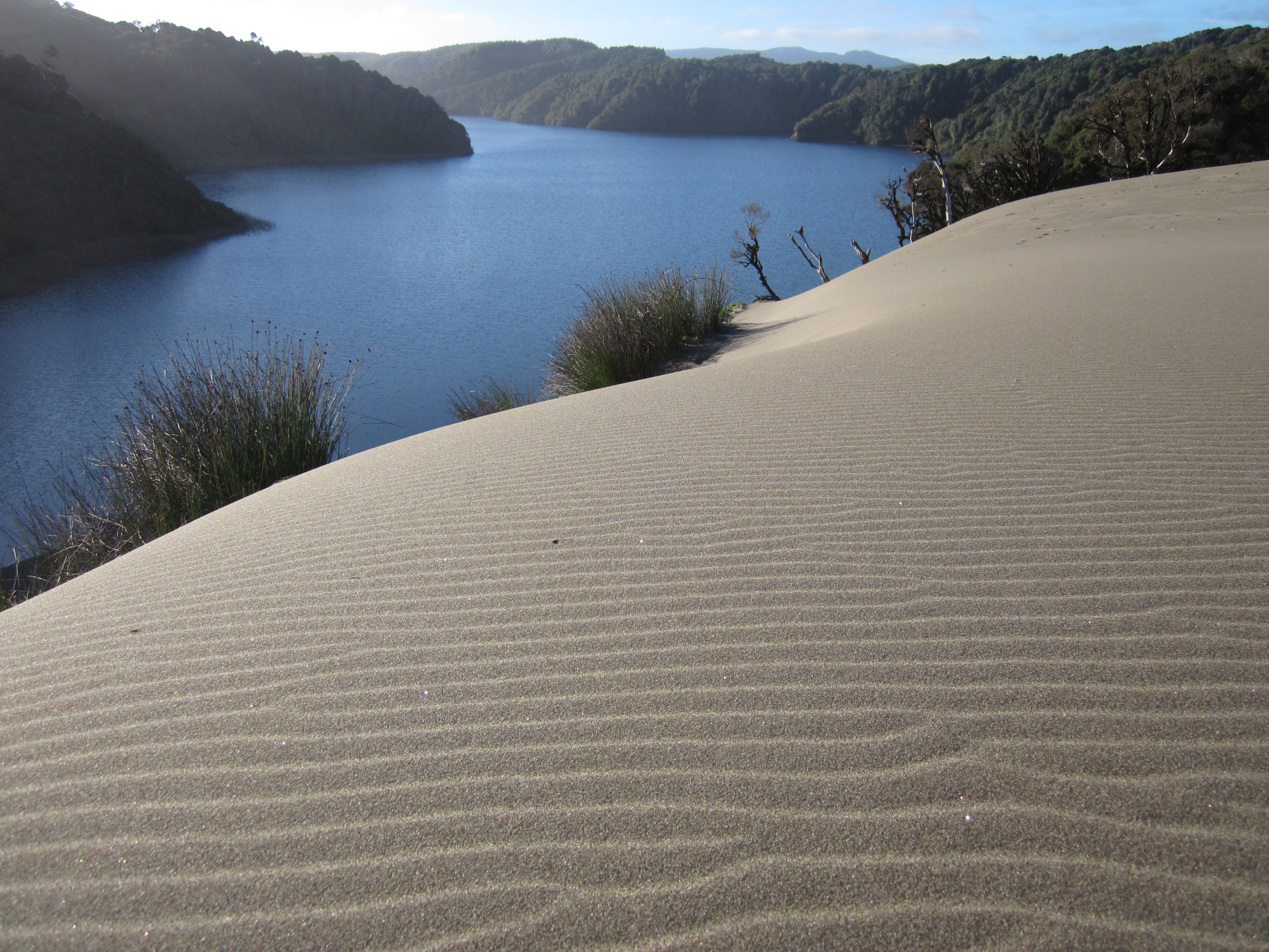 Lagunas de Colún